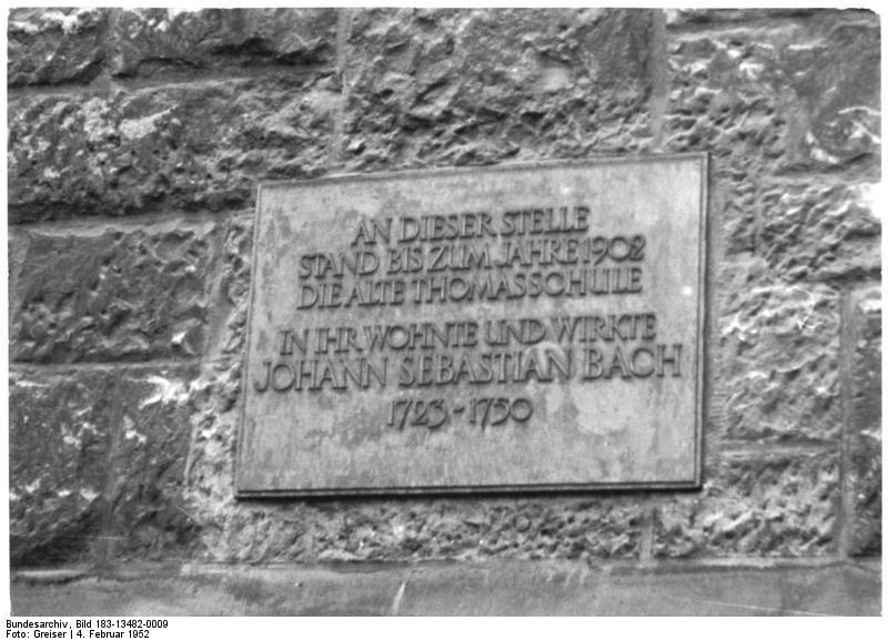 Leipzig, Thomaskirche, Gedenktafel am Pfarrhaus Zentralbild Greiser 4.2.1952 Die Stadt Leipzig Gedenktafel am Pfarrhaus der Thomaskirche. Leihweise Zentralbild